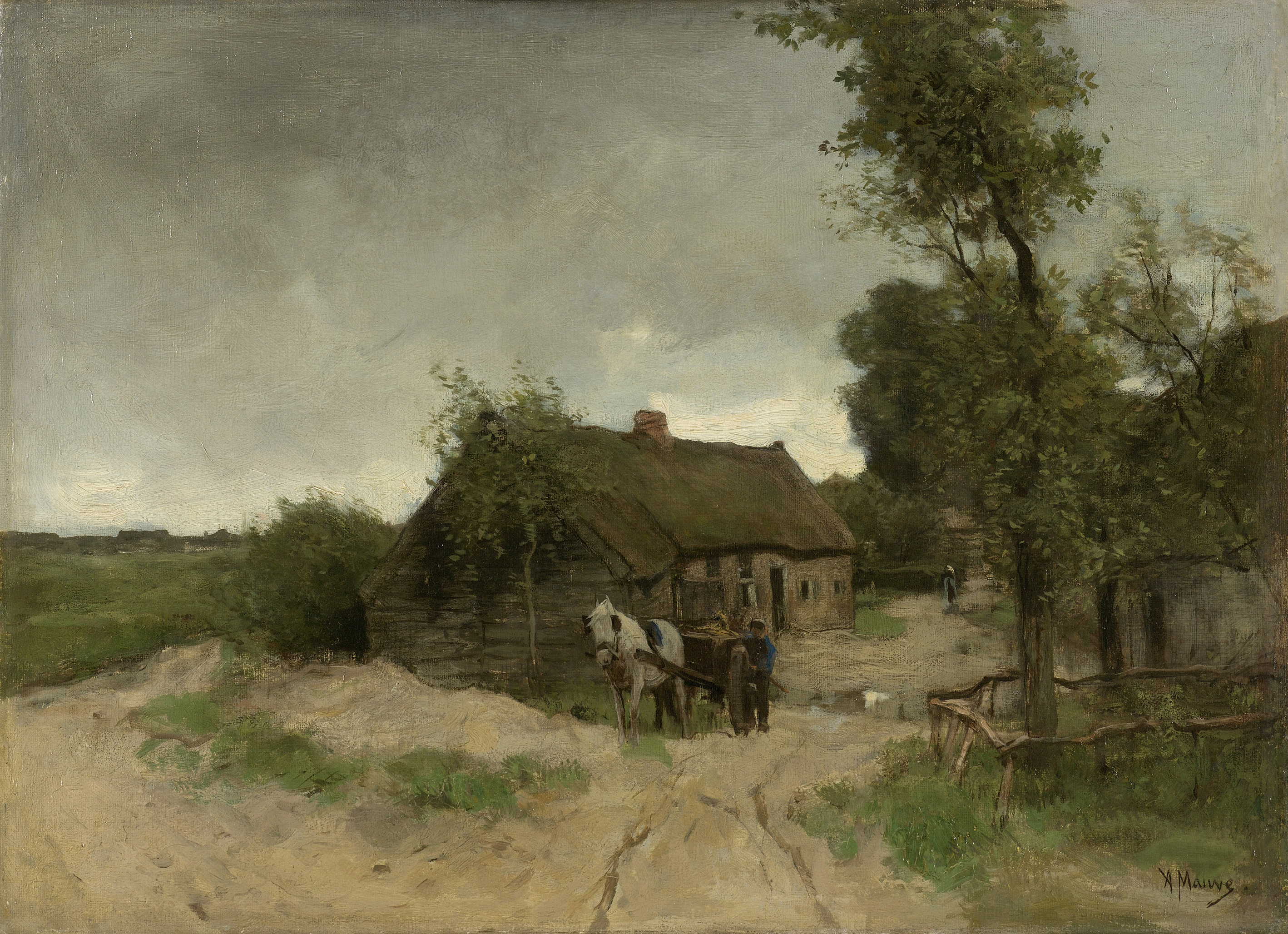 Een huis met schuur aan een zandweg bij de hei. Voor het huis staat een man achter een paard met wagen.